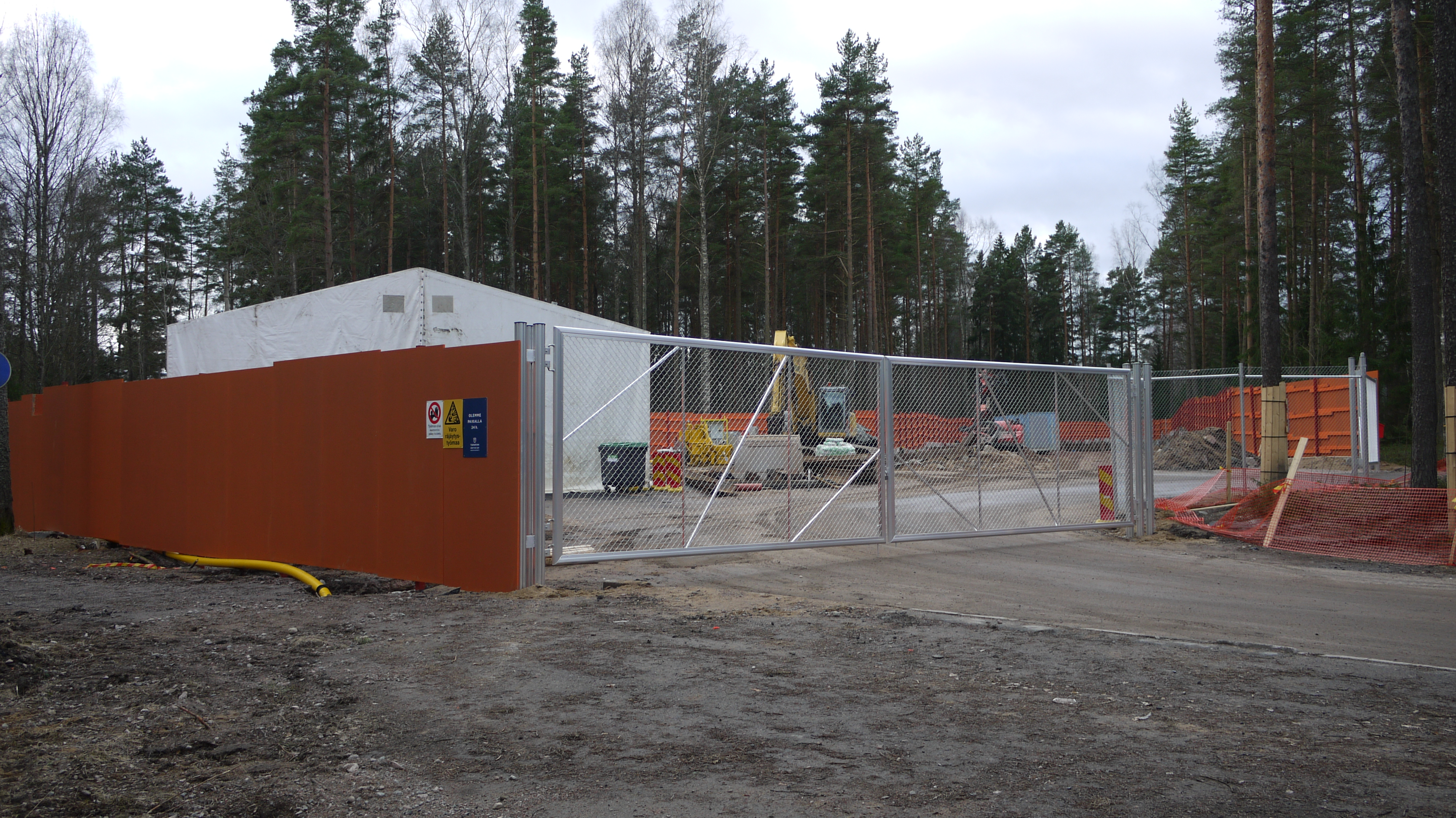 Kaitaan metroaseman työtunnelin rakennustyömaa